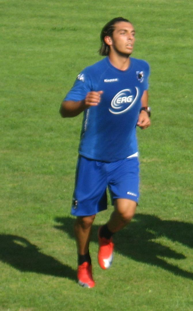 Il calciatore Guido Marilungo